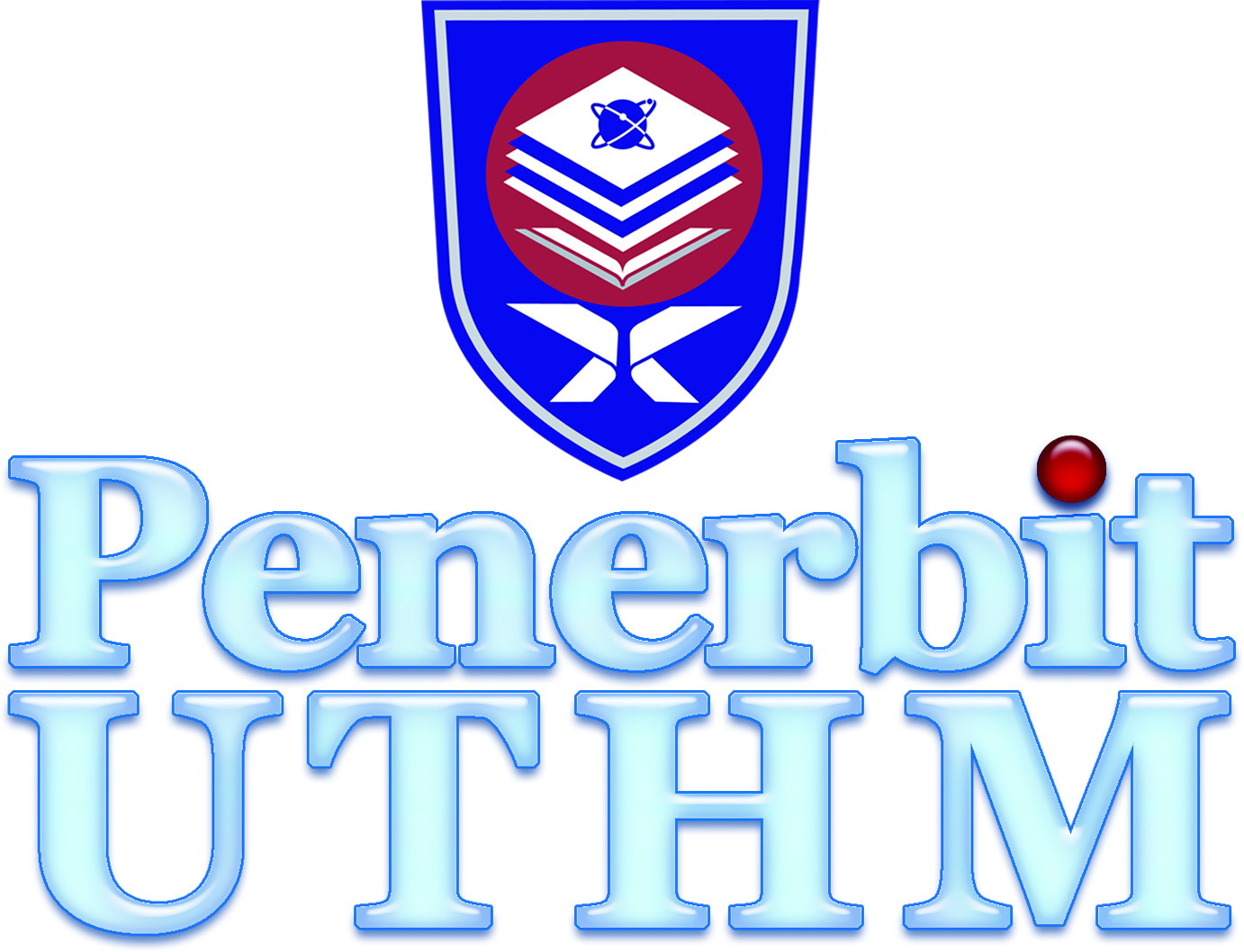 Logo rasmi Penerbit UTHM